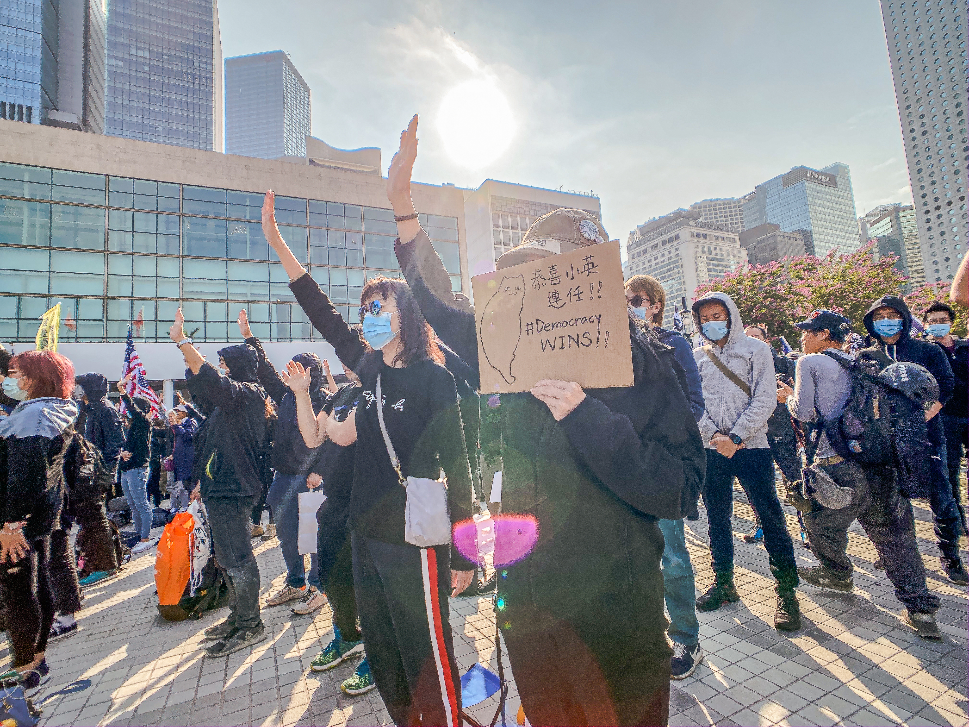 Hongkongers congrat Tsoi Ing-Wen